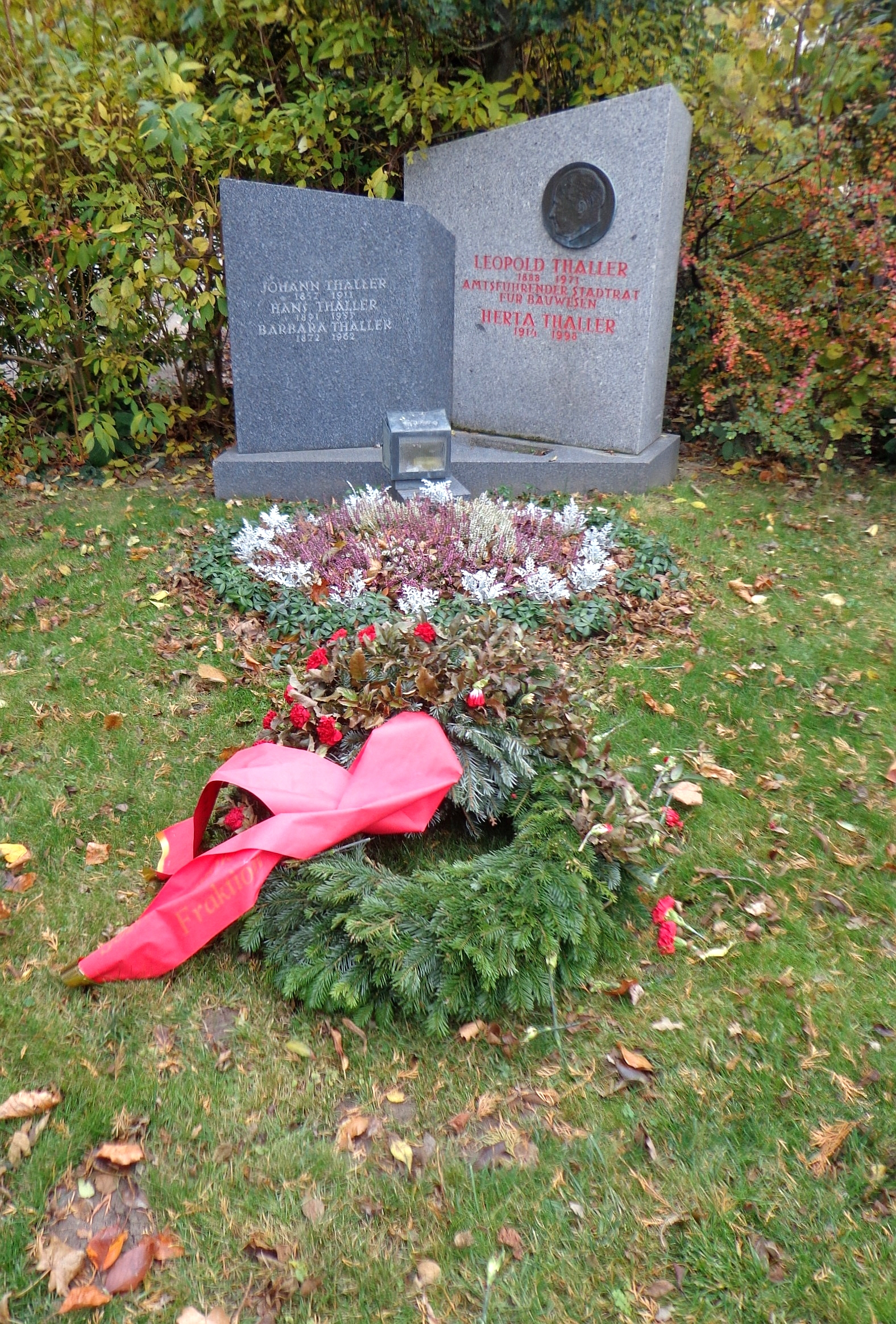 Wiener Zentralfriedhof - Gruppe 14 C, Ehrengrab von Leopold Thaller